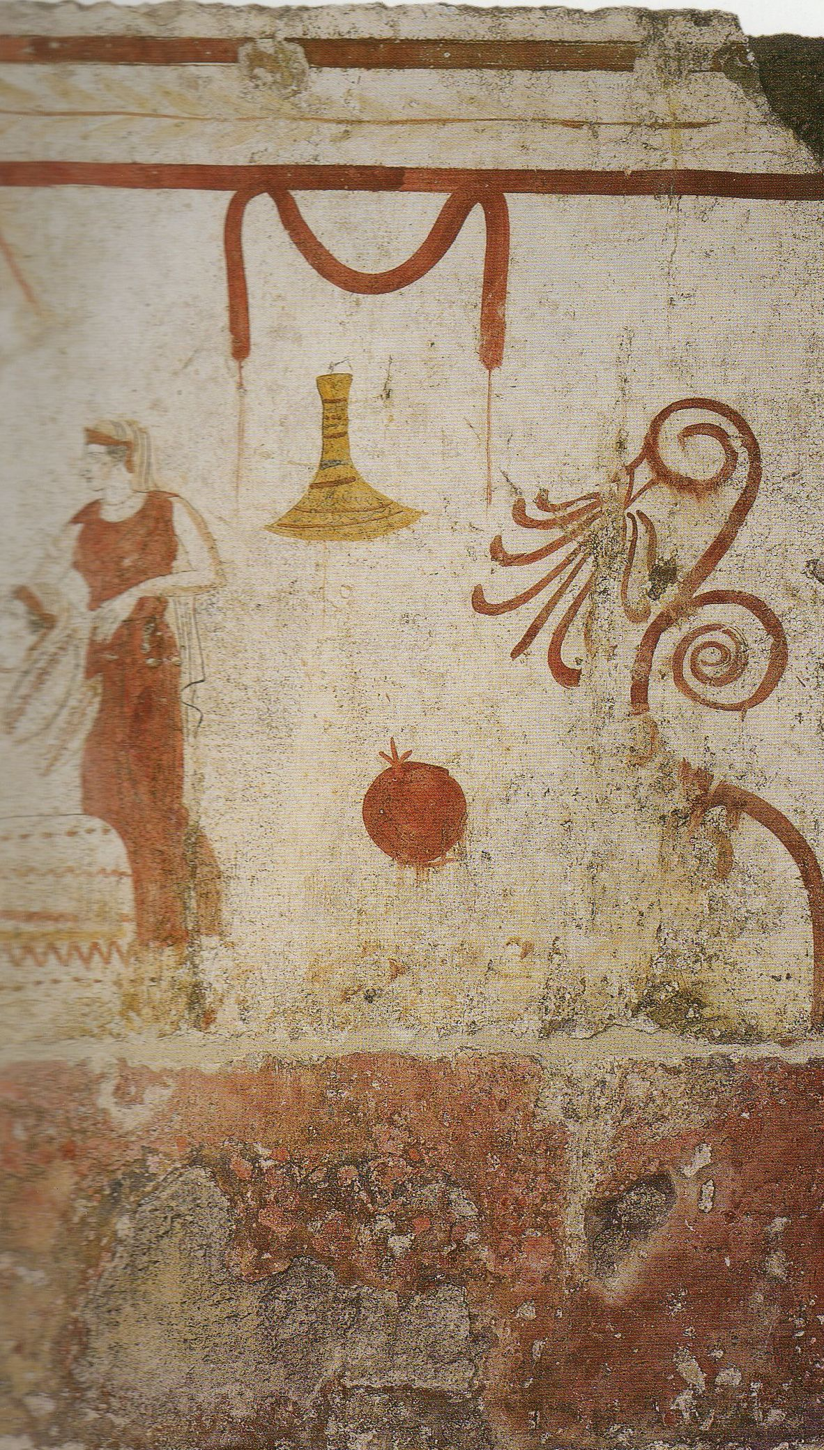 Paestum, Grab der Klagefrauen. Detail